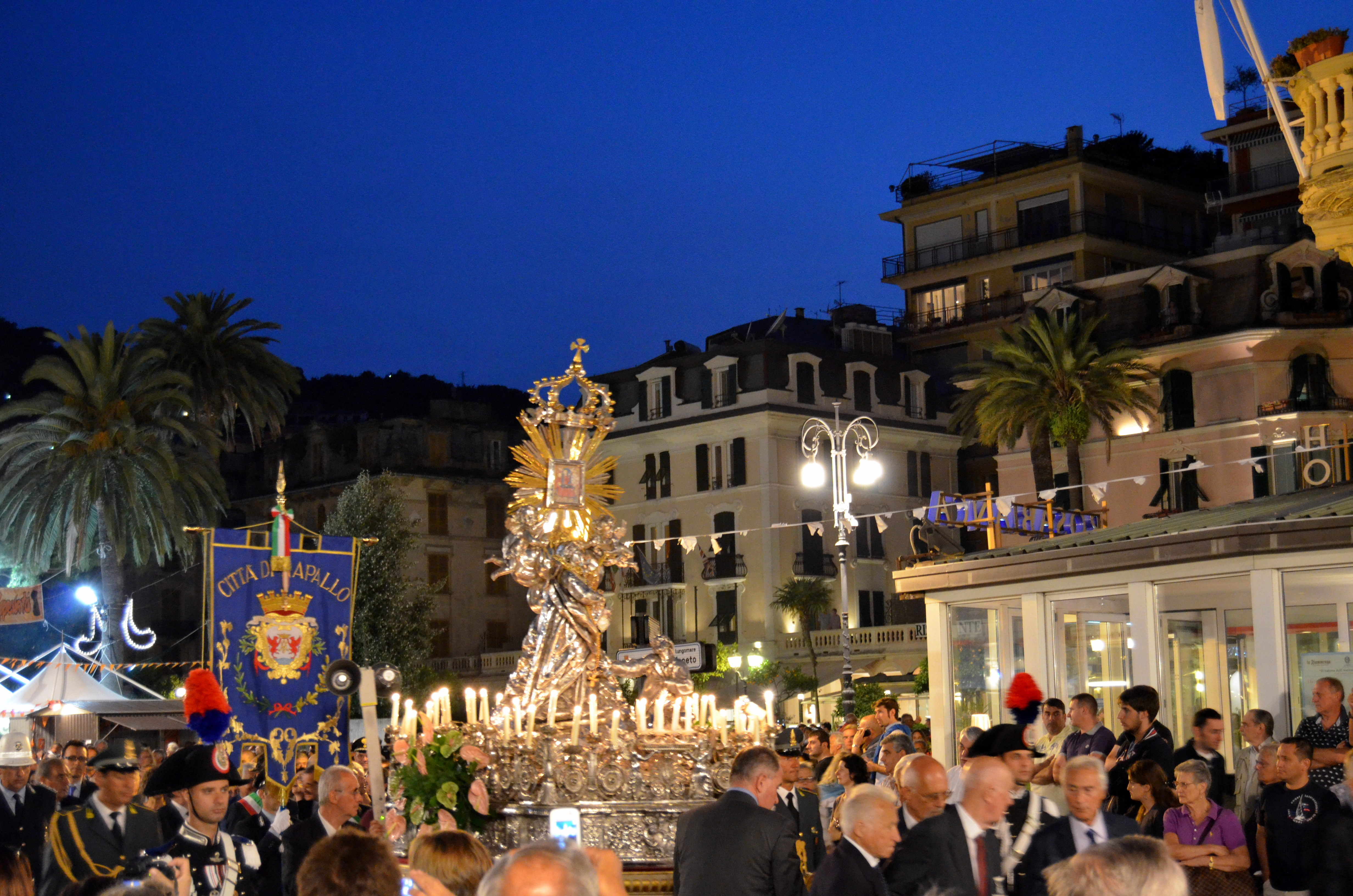 Processione per le festività patronali del 1-2-3 luglio 2014, lungomare di Rapallo, Liguria, Italia